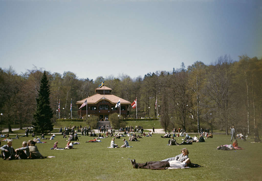 People in Slottsskogen ("Castle Forest") in Gothenburg. The building is the Large Restaurant from 1906, more known as Björngårdsvillan (The Bear-Garden Villa). Människor i Slottsskogen i Göteborg. Byggnaden är Stora Restaurangen från 1906, mer känd som Björngårdsvillan. Parish (socken): Göteborg Province (landskap): Västergötland Municipality (kommun): Göteborg County (län): Västra Götaland Photograph by: Fredrik Bruno Date: April 1948 Format: Colour slide Persistent URL: Read more about the photo database (in english)